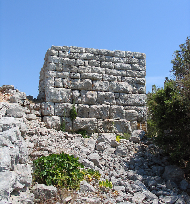 ruševine kule Tor na Hvaru